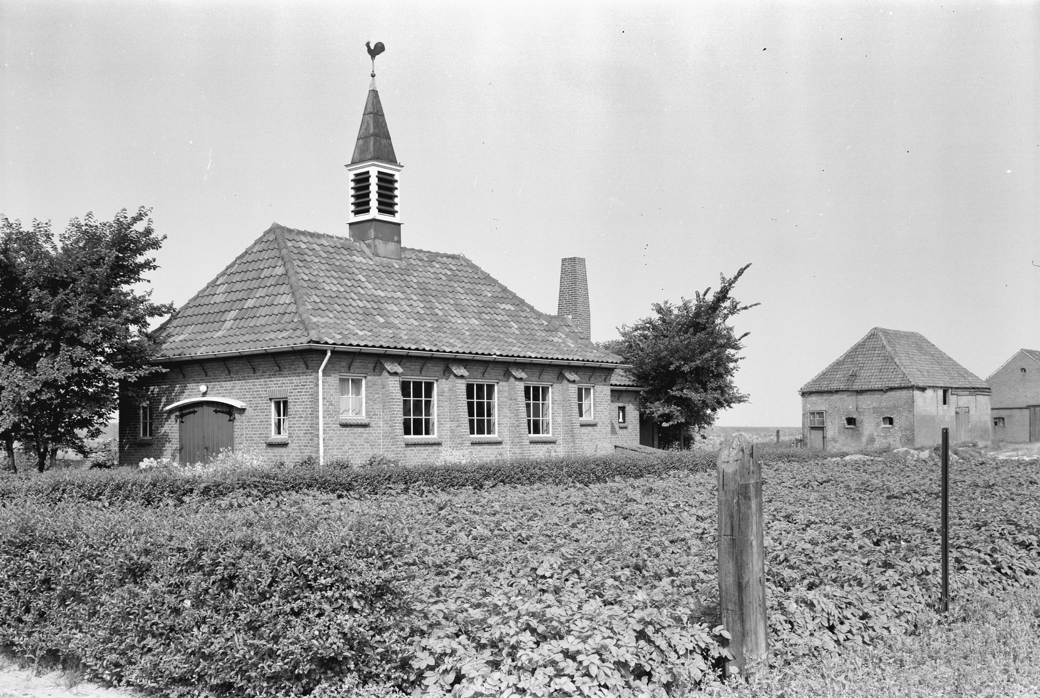 Kerkje: met militairgebouw - Rilland-Bath, Lillostraat 15 - Vrije Evangelische Gemeente